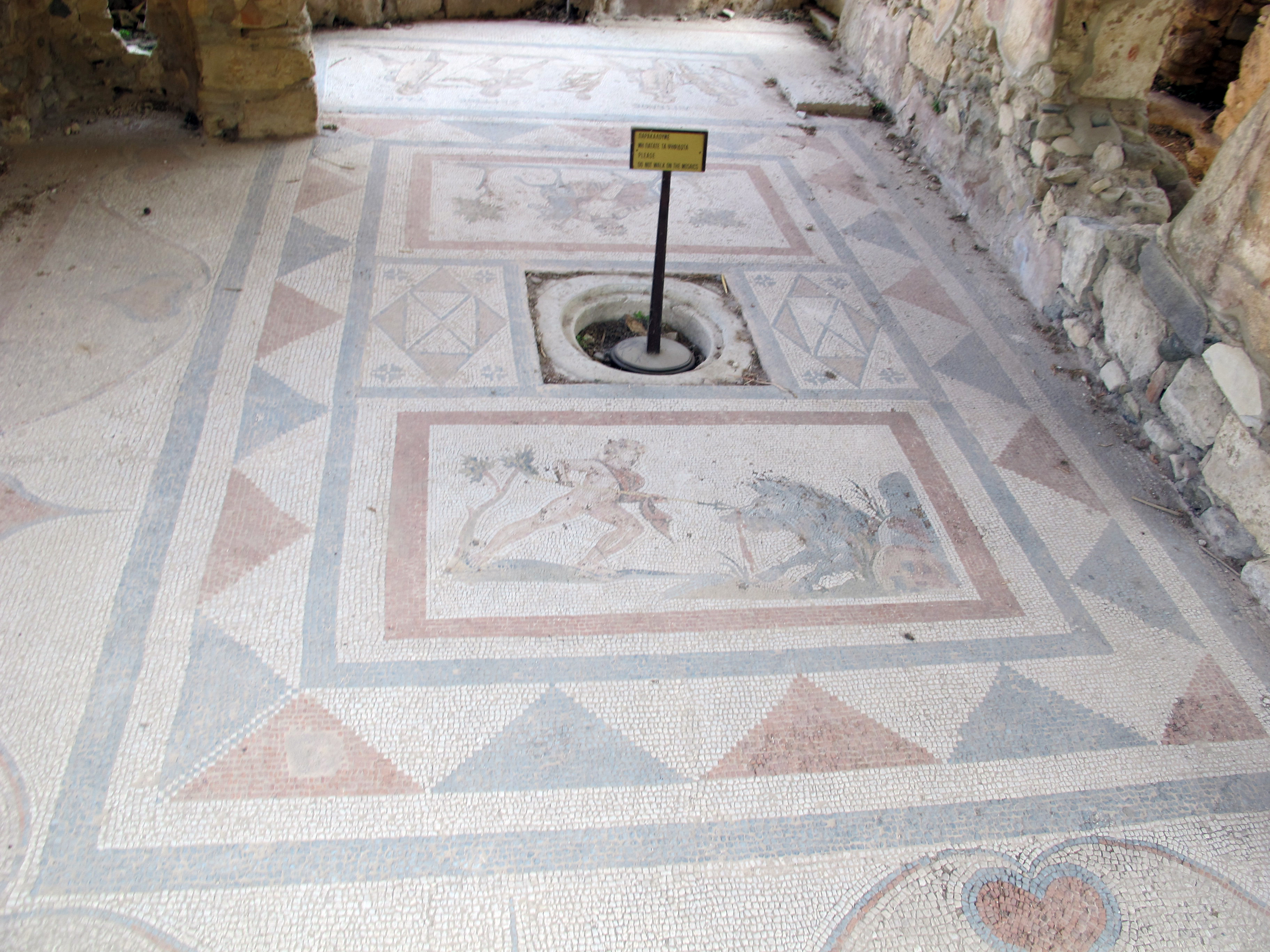 Kos città, case romane 11 mosaico